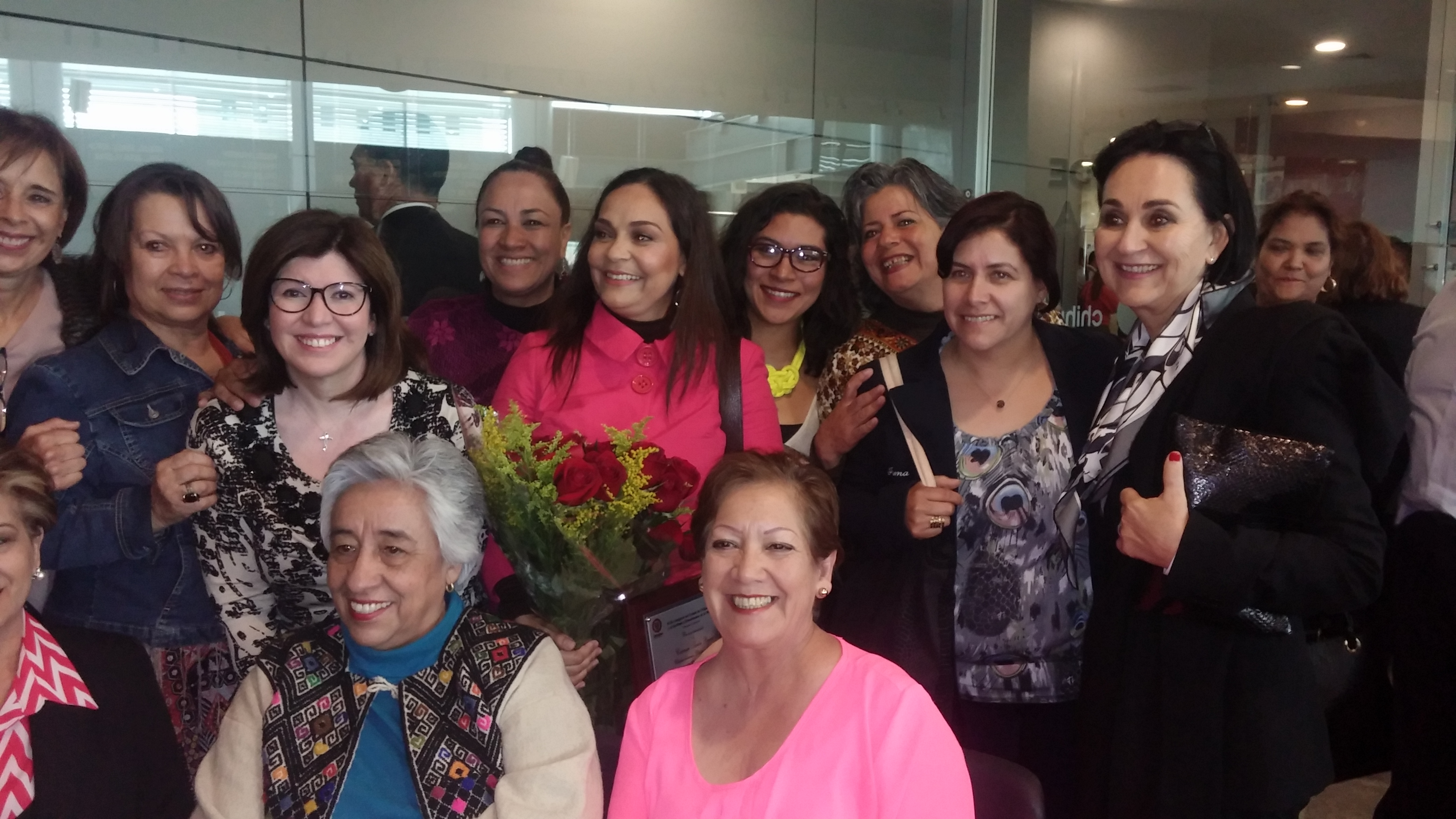 Carmen Tarin recibe premio Chihuahuense Destacada 2015